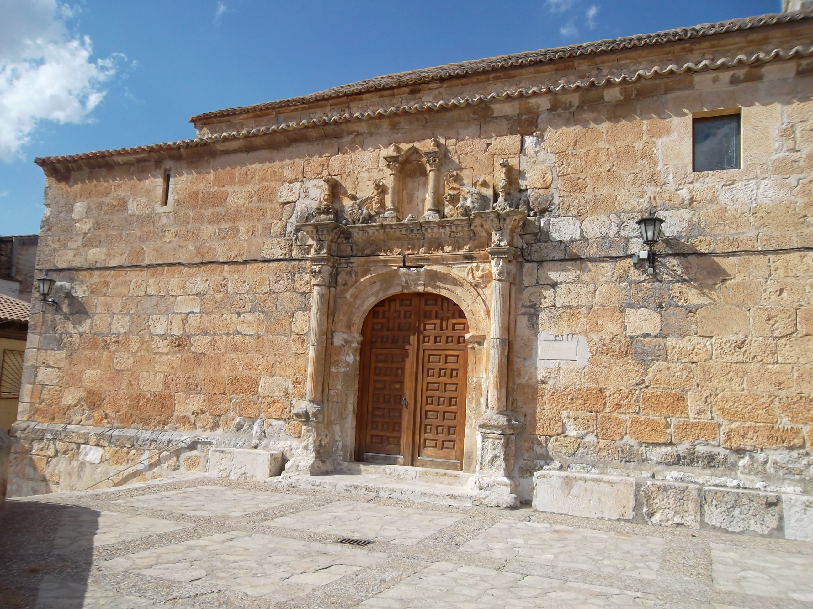 Lupiana-Iglesia de San Pedro Apóstol, construida en el siglo XVI en estilo gótico.Placa conmemorativa en la fachada, in memoriam de los "Caídos".